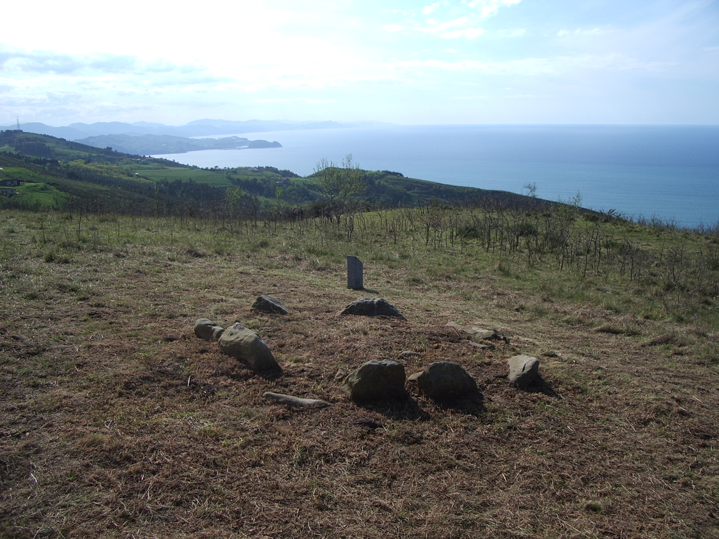 Mendizorrotz I harrespila edo cromlecha